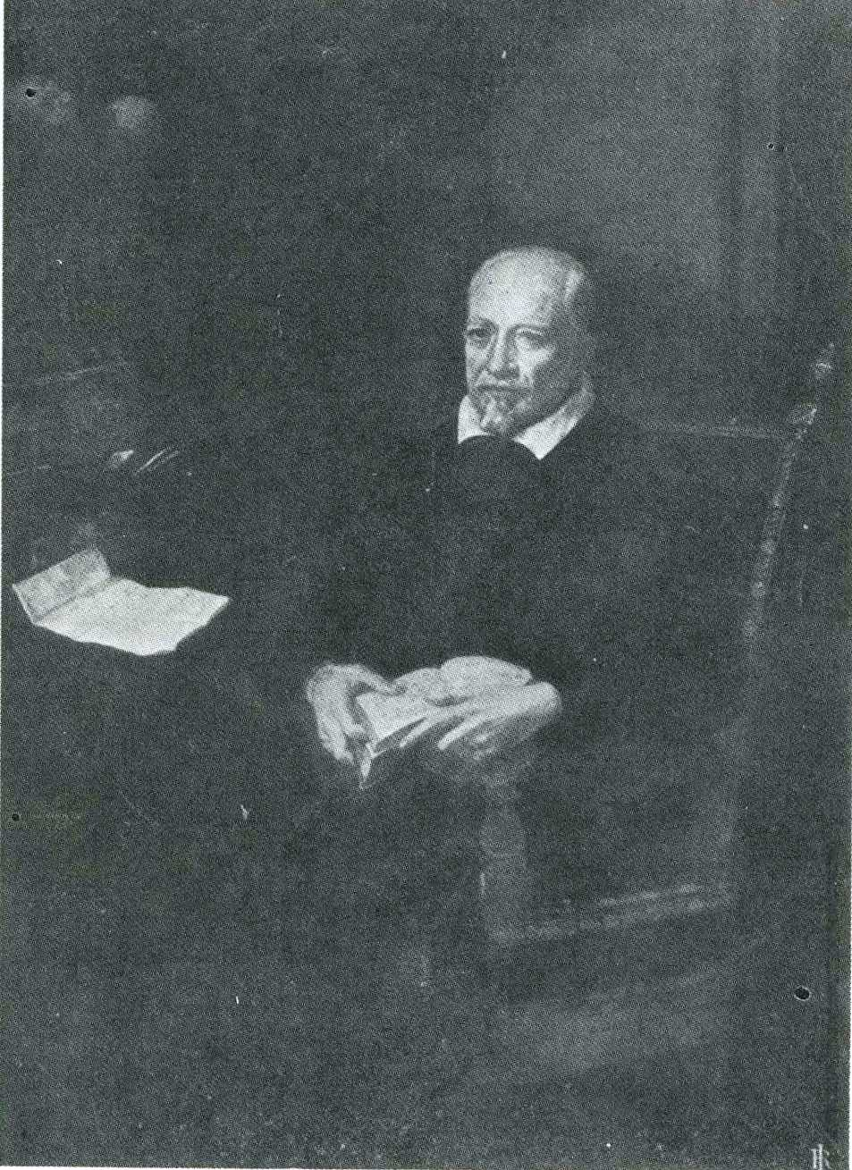 Antonino Alberti detto "il Barbalonga", Ritratto del Padre Alberti, Messina Museo Regionale.